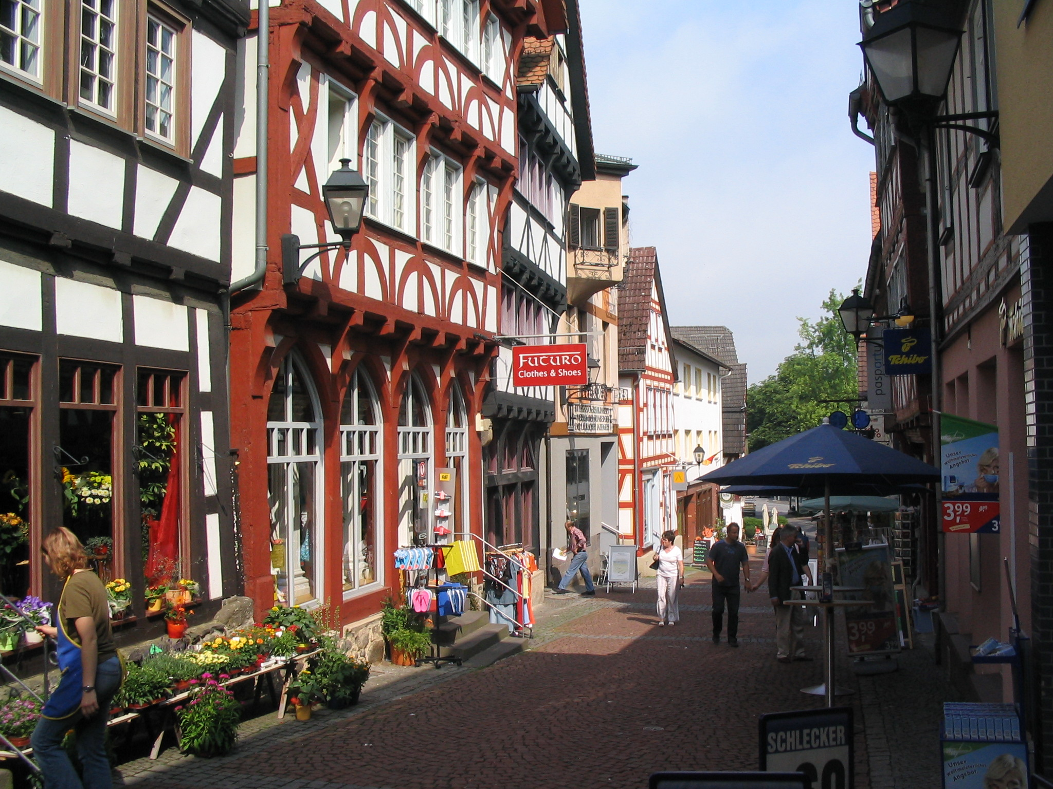 Street in Grünberg, Germany. // Einkaufsstraße (bergab) in Grünberg, Hessen